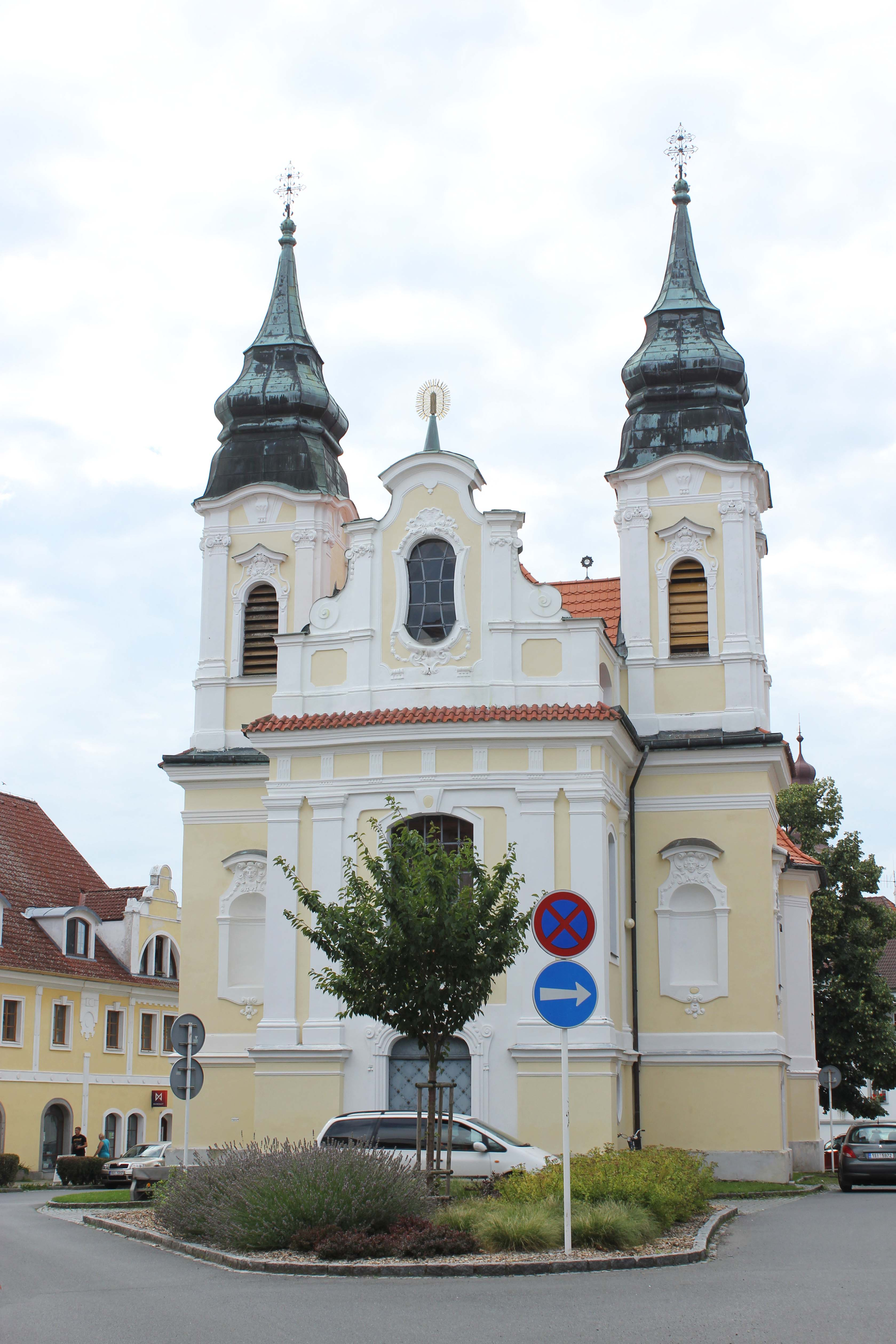 Kostel svatého Jana Nepomuckého v Rožmitále pod Třemšínem